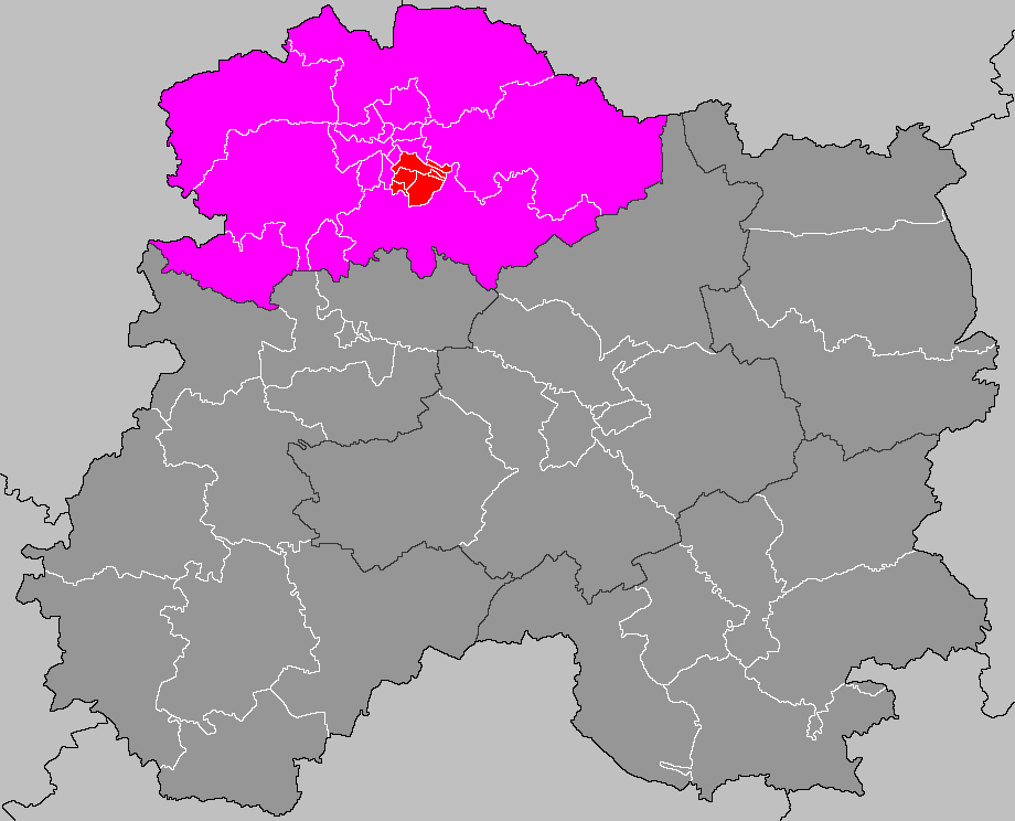 Localisation du canton de Reims-7